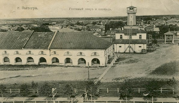 Гостиный двор и площадь